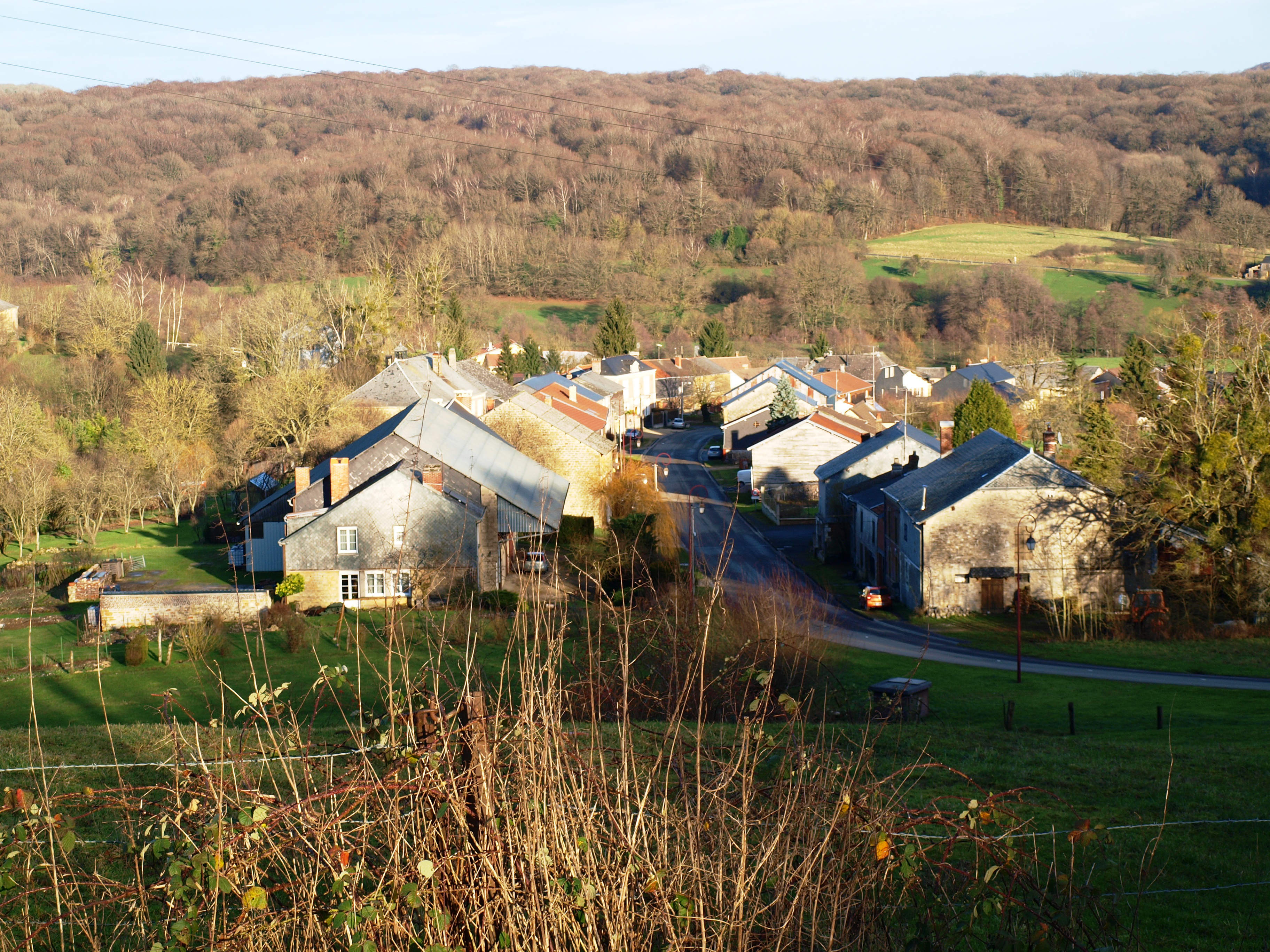 Chagny (Ardennes, France) ; le village au fond de la vallée ....